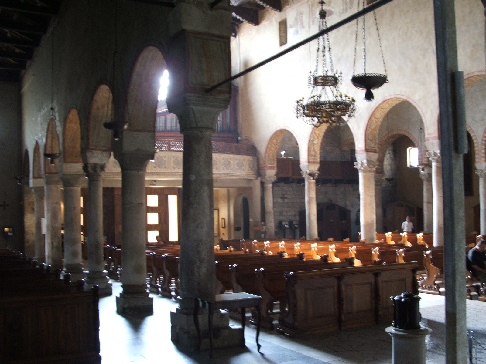 Immagine da Trieste. Cattedrale di San Giusto